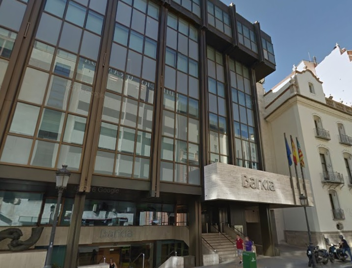 Sede social de Bankia, en la calle las Barcas de Valencia